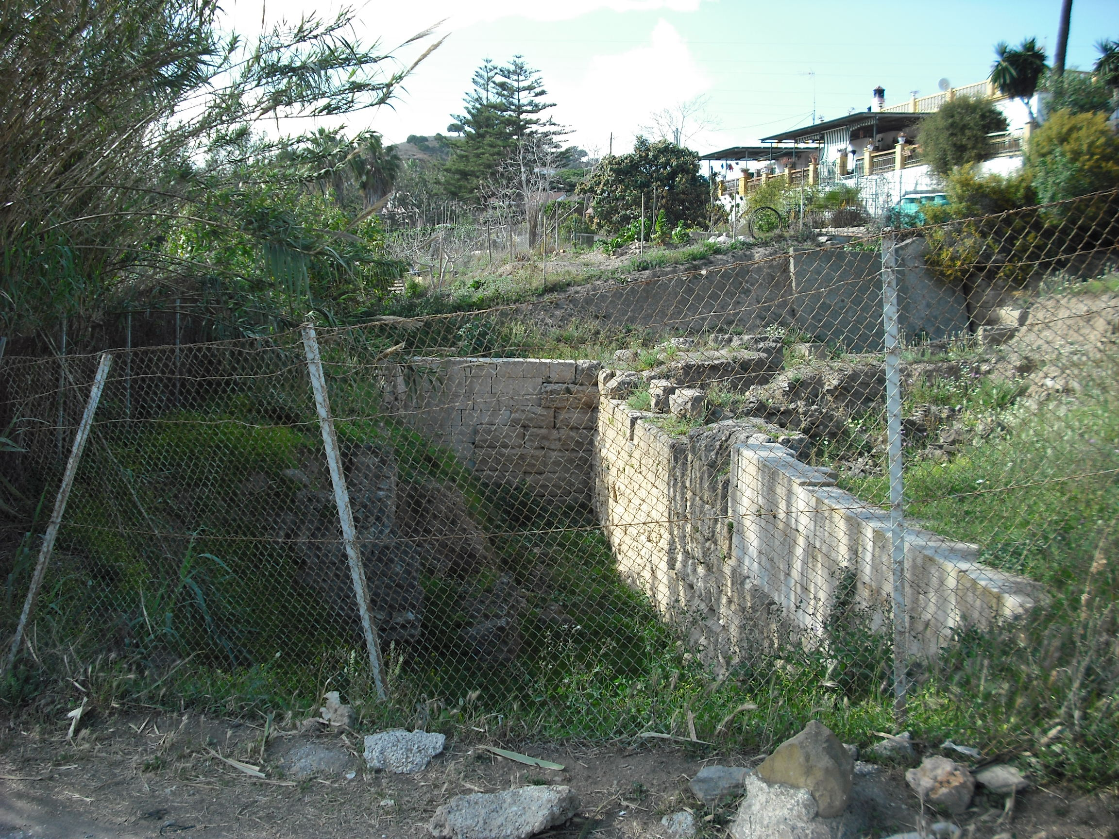 Toscanos, Cerro del Peñón, Cerro Alarcón, Cerro del Mar y Necrópolis de Jardín